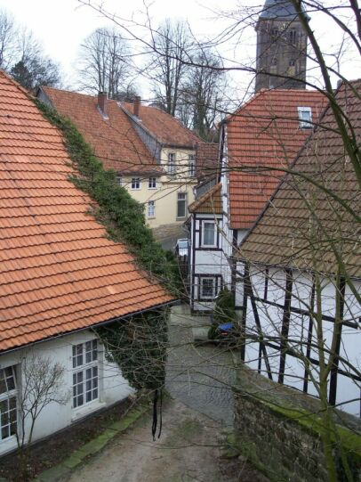 Tecklenburg, Teil des alten Stadtkerns